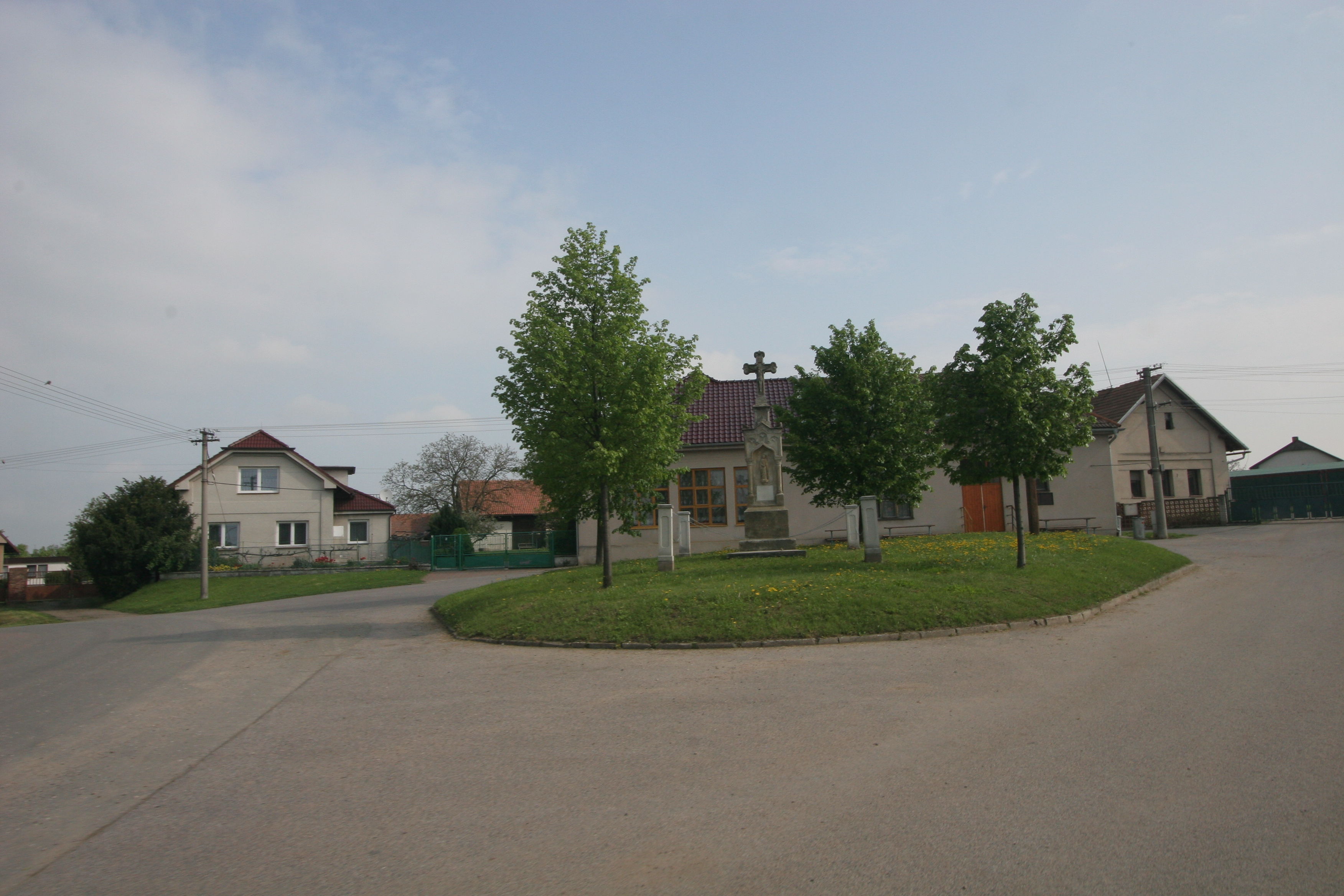 Chýšť křížek